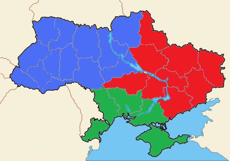 Економічні регіони УРСР